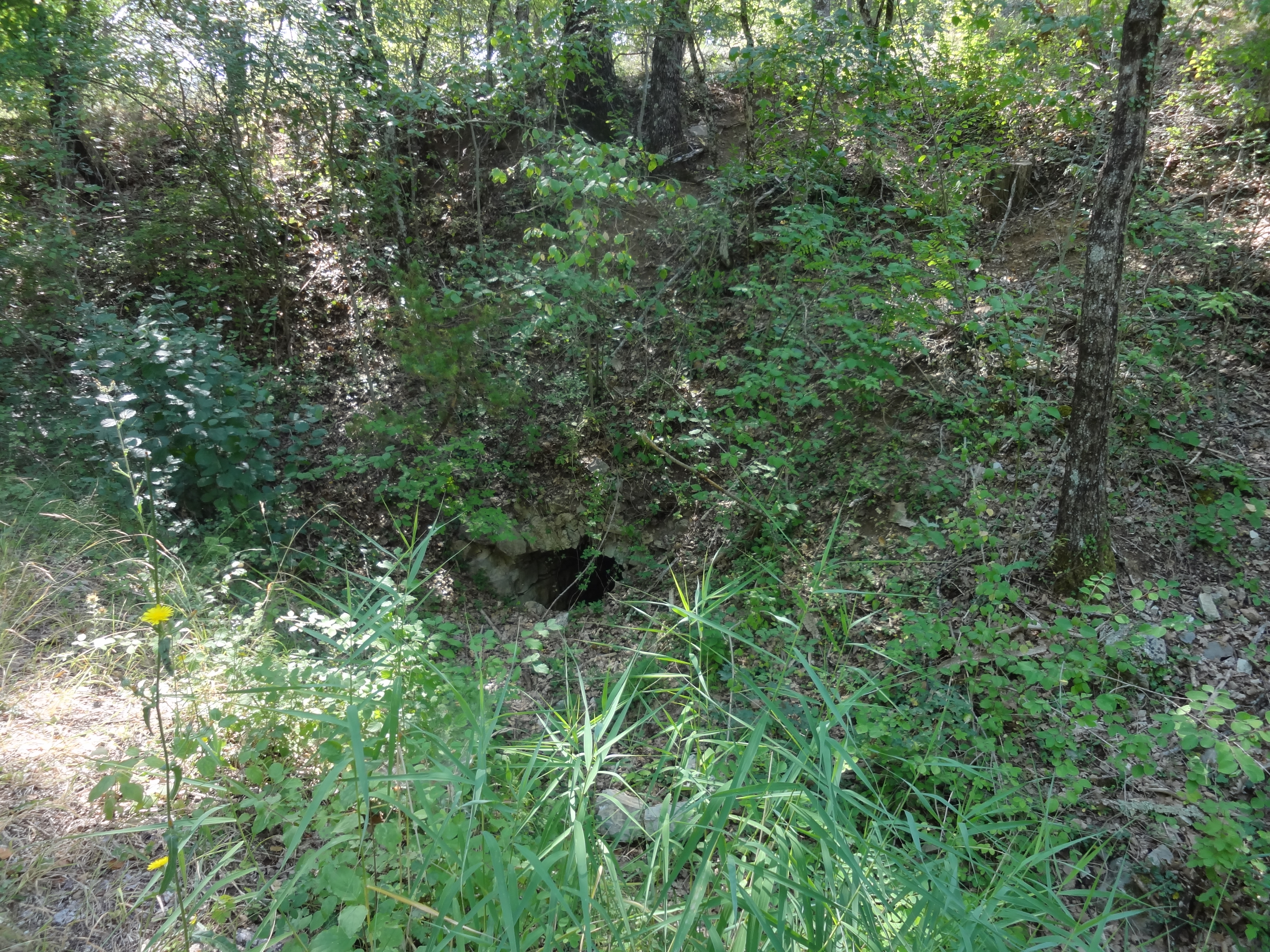 source sulfureuse à stmartin les eaux (Alpes-de-Haute-Provence)